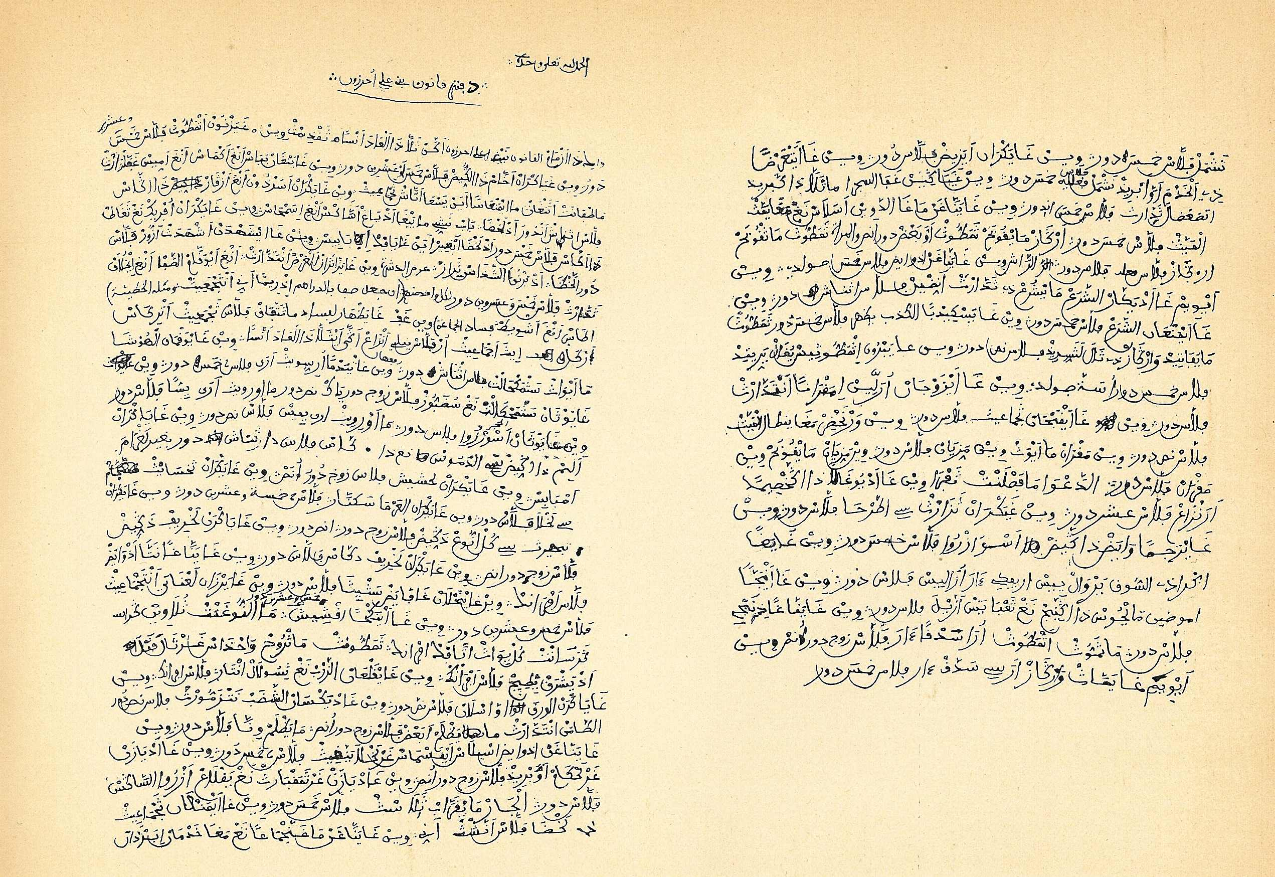 Text of a Kabyle Kanun (At Ali u Herzun)